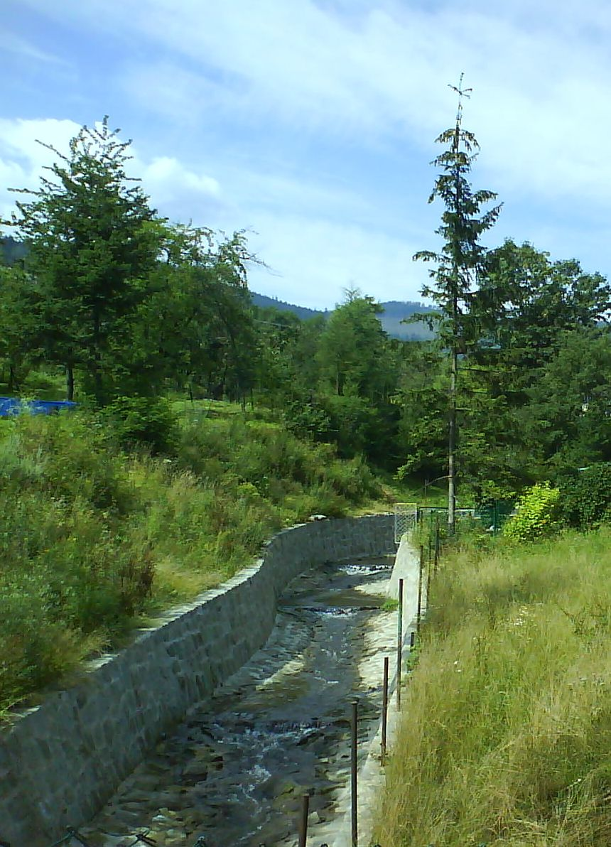 Potok Wieśnik w Radziechowach